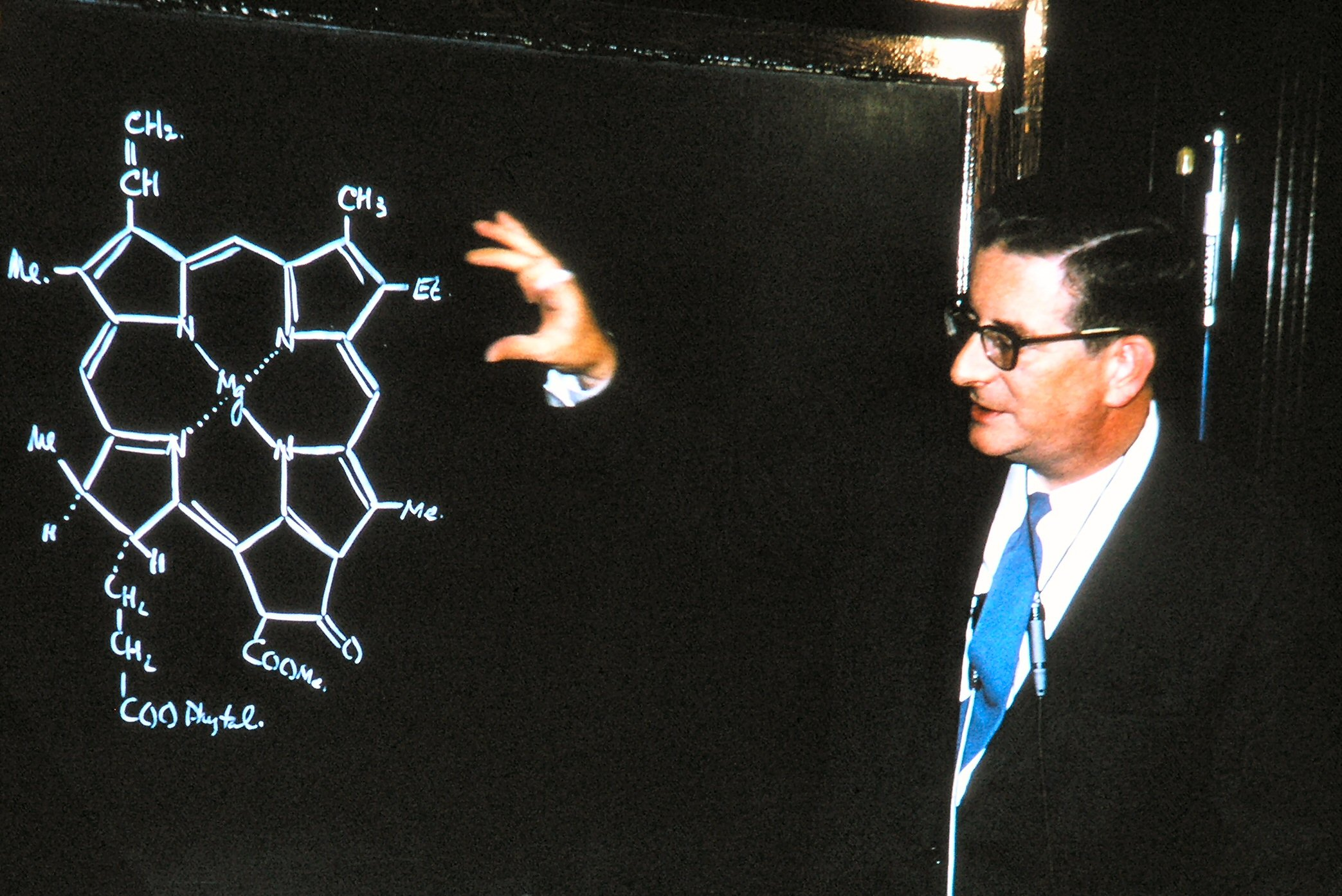 Robert B. Woodward Harvard University, Cambridge (Mass.), 1965